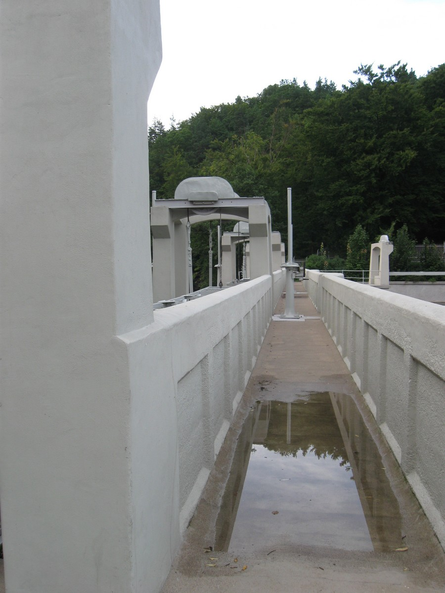 Jaz w Kolbudach